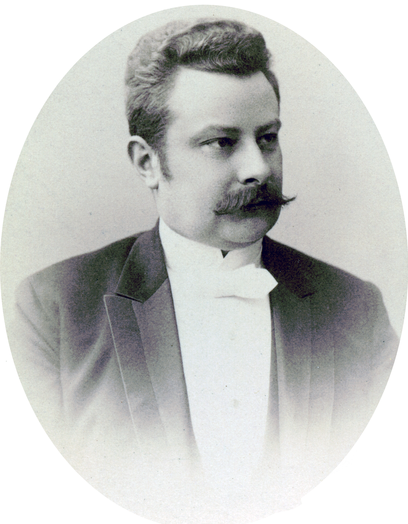 August Arppe, teaterdirektör, 1894